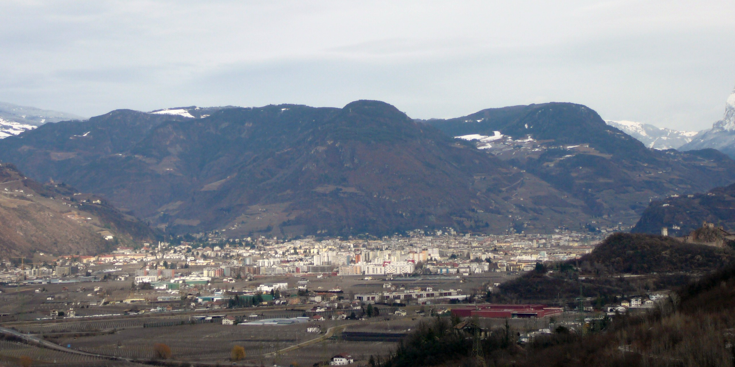 Panorama Bolzano